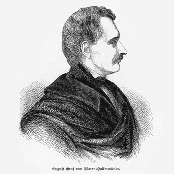 August Graf von Platen (1796-1835), dargestellt im Profil, Holzstich.